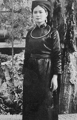 TrangphucTay